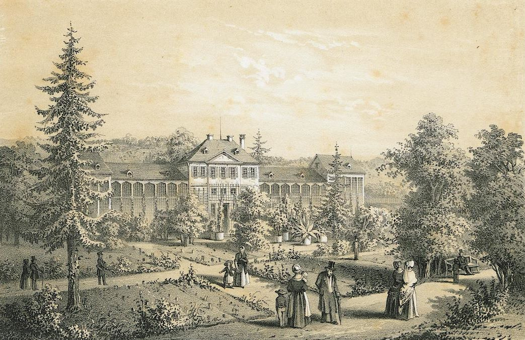 Der Botanische Garten in Tübingen mit Blick auf die Orangerie (Lithographie)